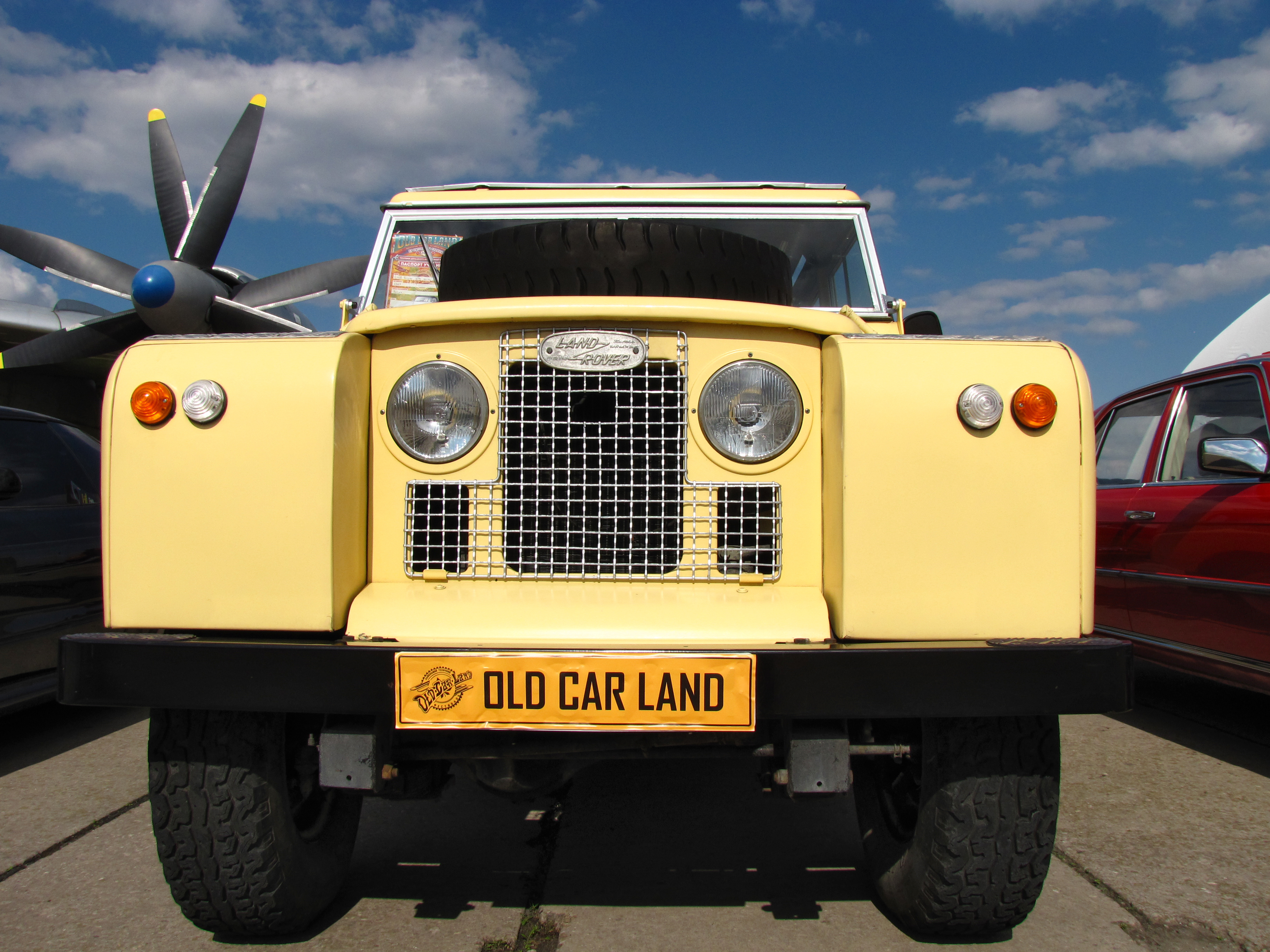 Land Rover Series II в Киеве, на выставке "Old Car Land"